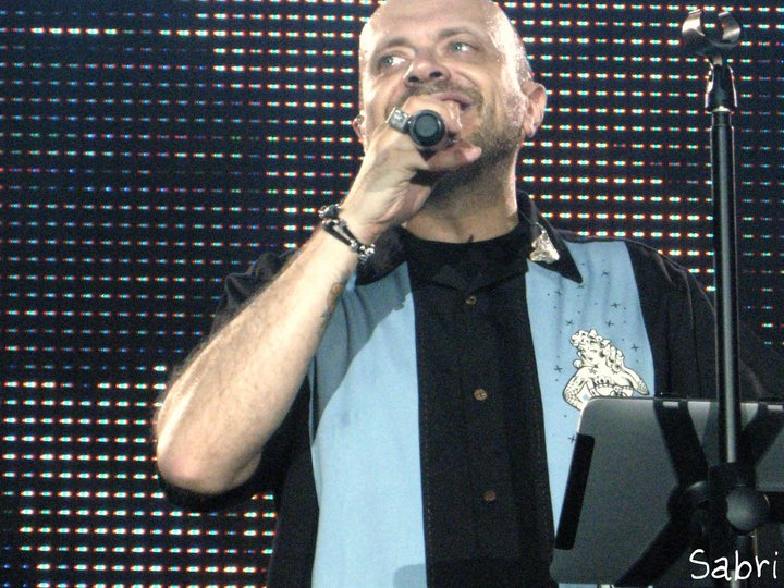 Max Pezzali